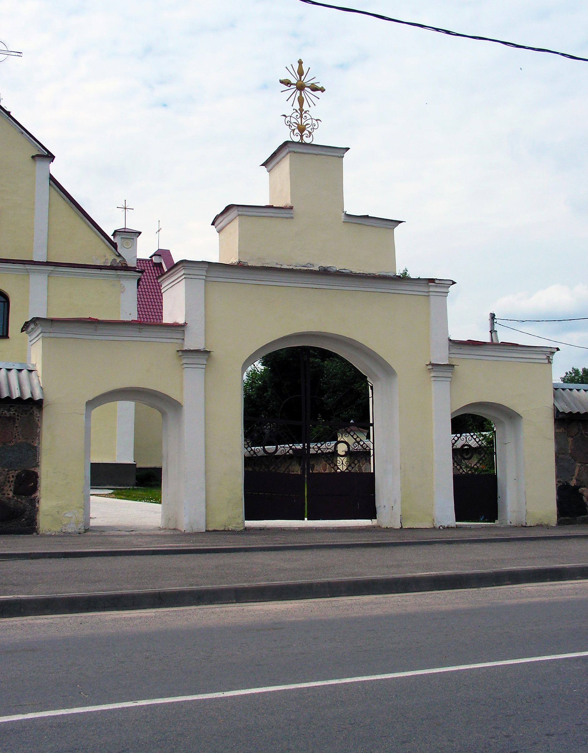 Беларуская (тарашкевіца): Касцёл Найсьвяцейшай Тройцы. в. Жодзішкі This is a photo of Belarusian heritage monument. Reference number: 412Г000594 ( WLM)